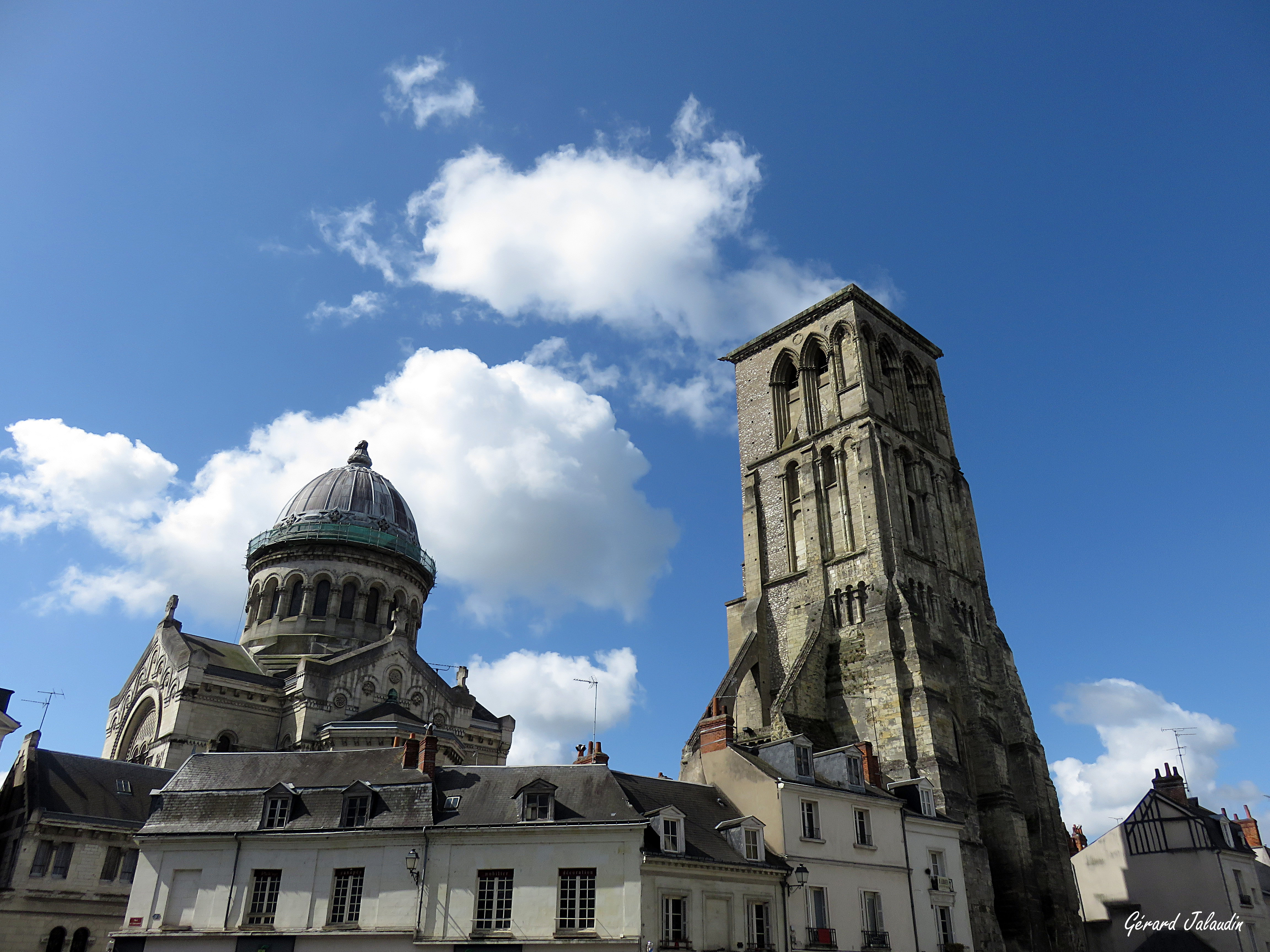 La tour Charlemagne et le dôme de la basilique St Martin. La statue de St Martin premier évêque de Tours qui été érigée en haut de ce dôme a été provisoirement retirée pour être restaurée.